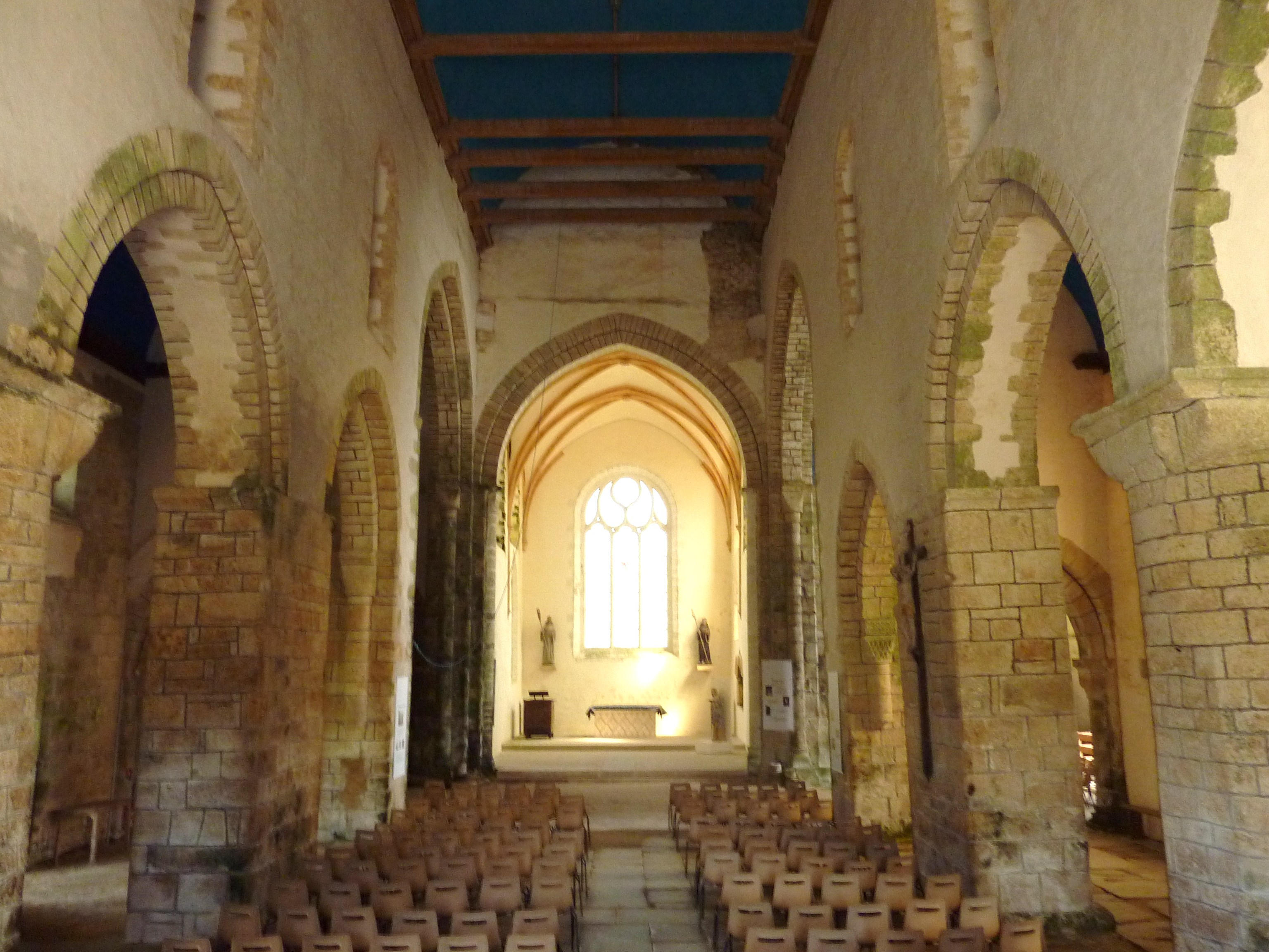 Intérieur de l'église abbatiale du Relec en Plounéour-Ménez (29).